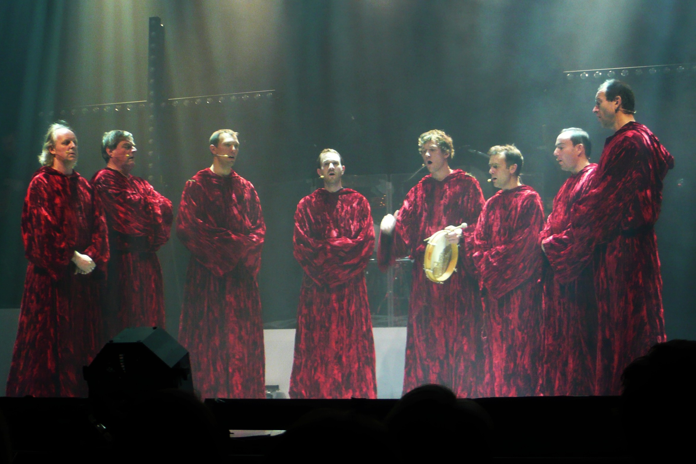 Gregorian und Amelia Brightman live im Konzerthaus Freiburg